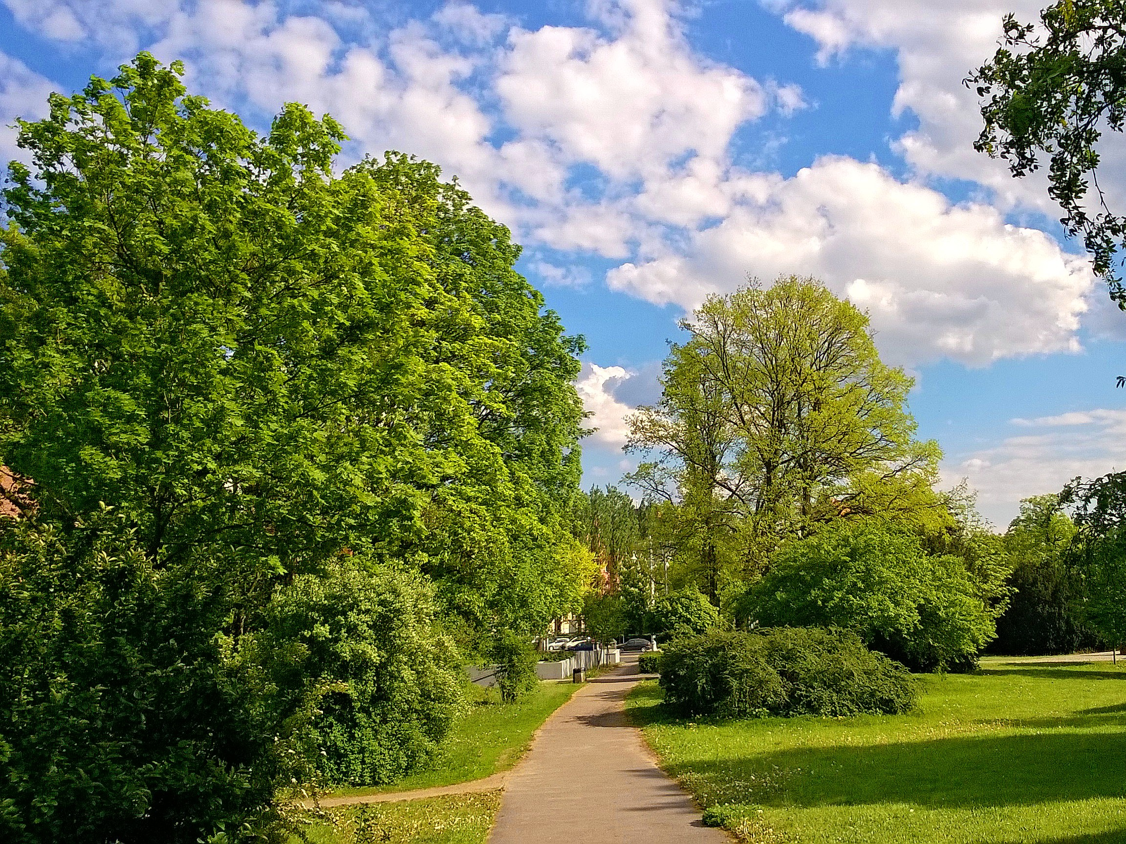 Część zielona „Jordanek” w Toruniu